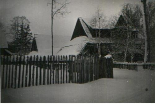 Skrzyzowanie w Dlugopolu